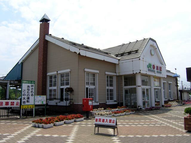 Sunagawa Station in Hakodate Main Line, Japan